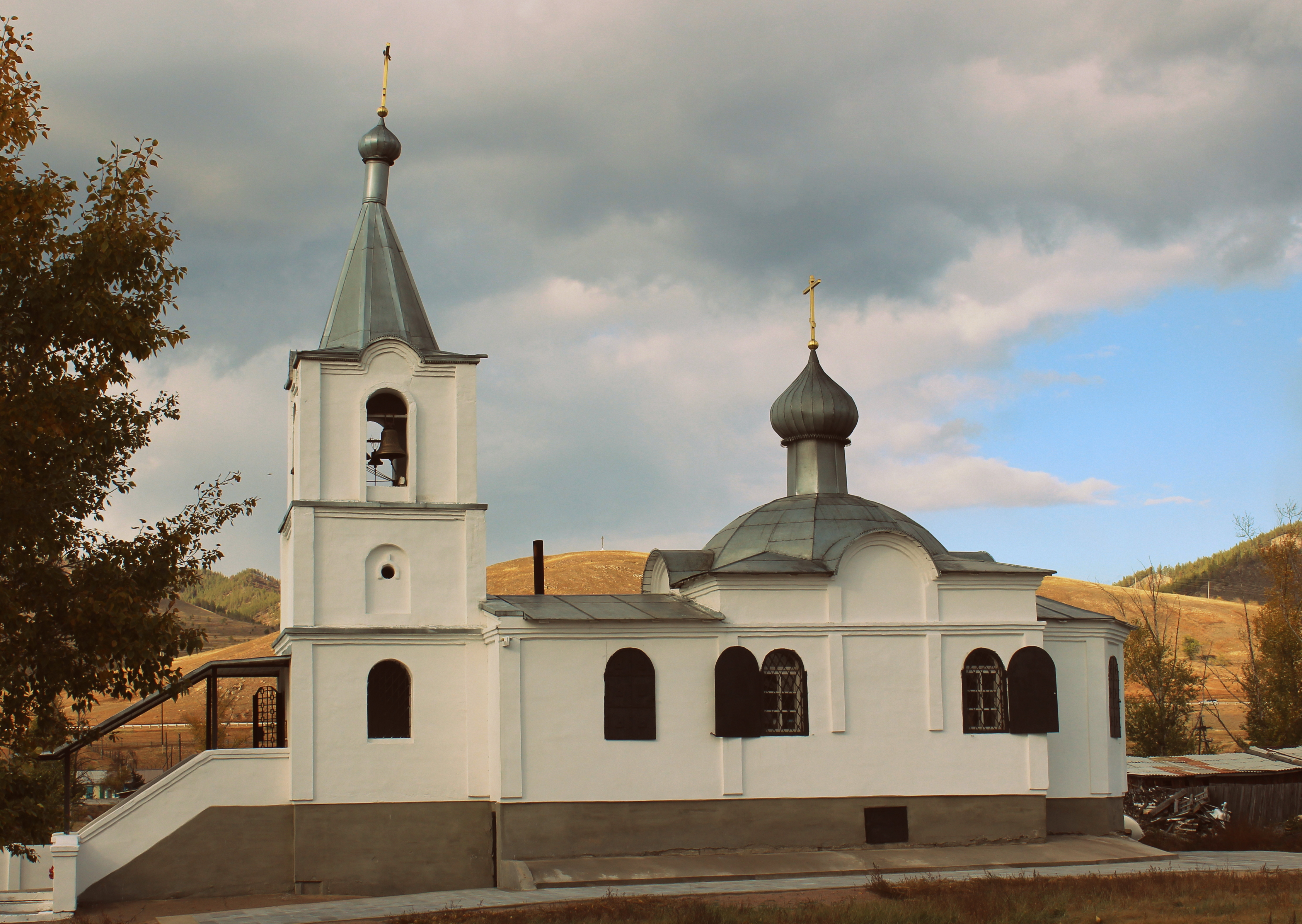 Русская древлеправославная церковь в Тарбагатае. Бурятия